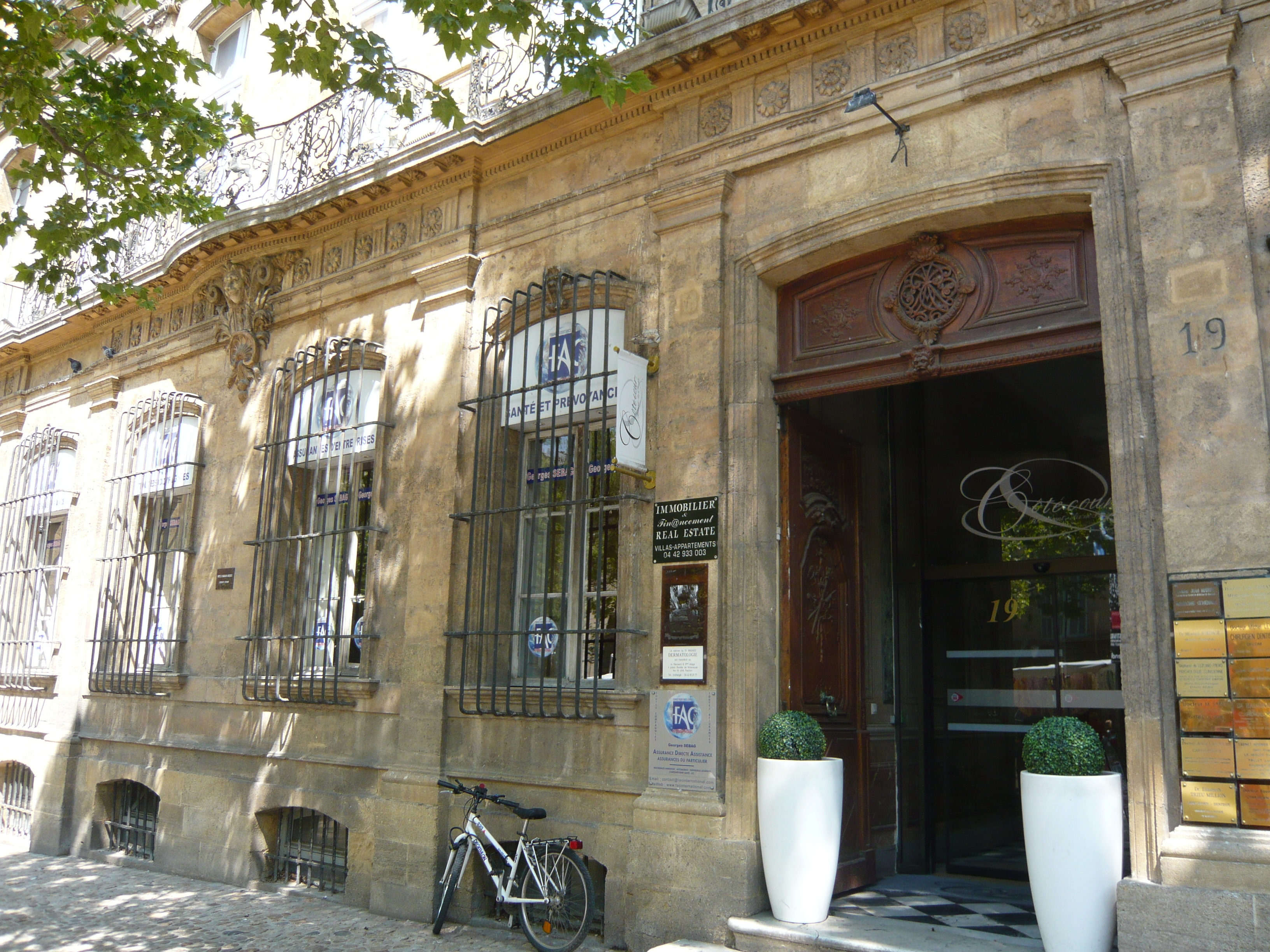 Hôtel d'Arbaud-Jouques, 19 cours Mirabeau, 17 rue Courteissade, Aix-en-Provence (France). Cet imposant hôtel, avec ses huit travées de front, présente plusieurs particularités. La façade en belles pierres de taille, unit deux corps de bâtiments achetés par Elzéar d’Arbaud-Jouques, futur Président du Parlement de Provence et par sa mère. Il a conservé sa façade d’origine. La répartition des ordres des pilastres est classique, dorique, ionique et corinthien, mais la porte placée sur le côté droit du bâtiment et la riche ornementation des battants par des trophées, le situent déjà dans l’architecture du 18e siècle (1700-1732). Les ferronneries élégantes des balcons et les mascarons gracieux des clés de baies achèvent de faire de cette façade une des plus belles d’Aix au 18e siècle.